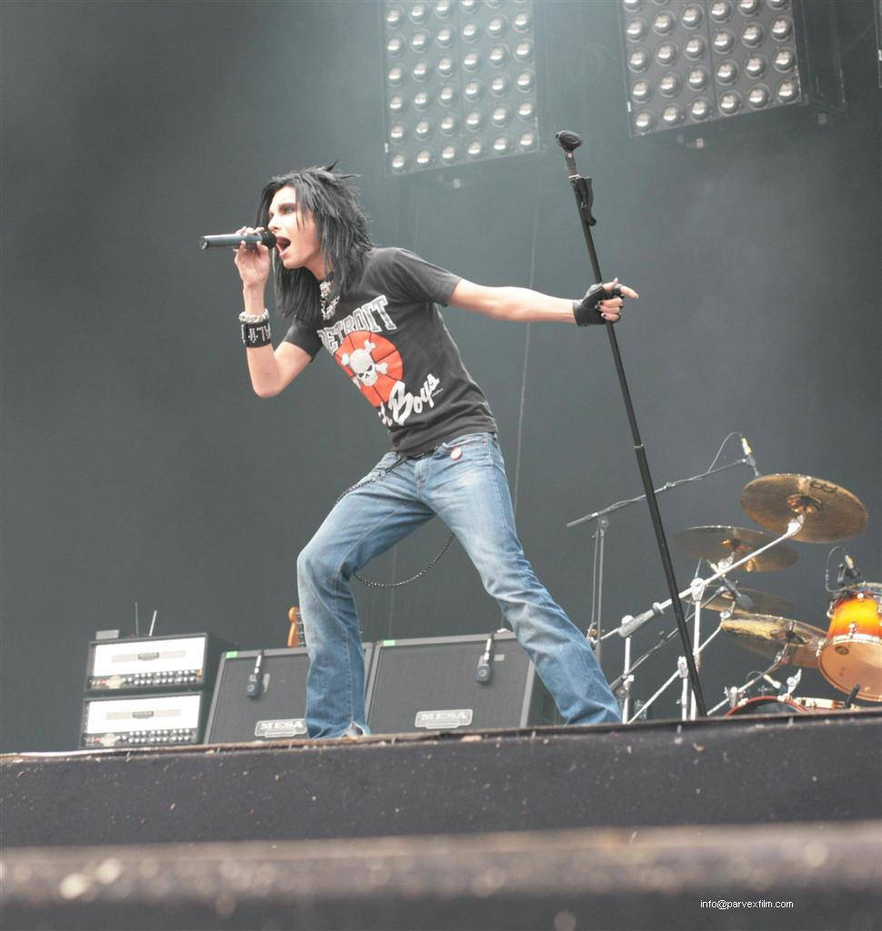 Bill Kaulitz, from Tokio Hotel, performing in Hessisch-Lichtenau, Germany.